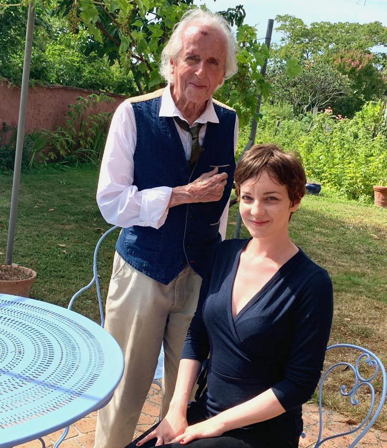 Christian Gasc et Caroline Plaud dans le jardin de "Loustalet d’Anicette à Valence d’Agen.